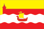 Флаг города Лыскова, Нижегородская область, Россия